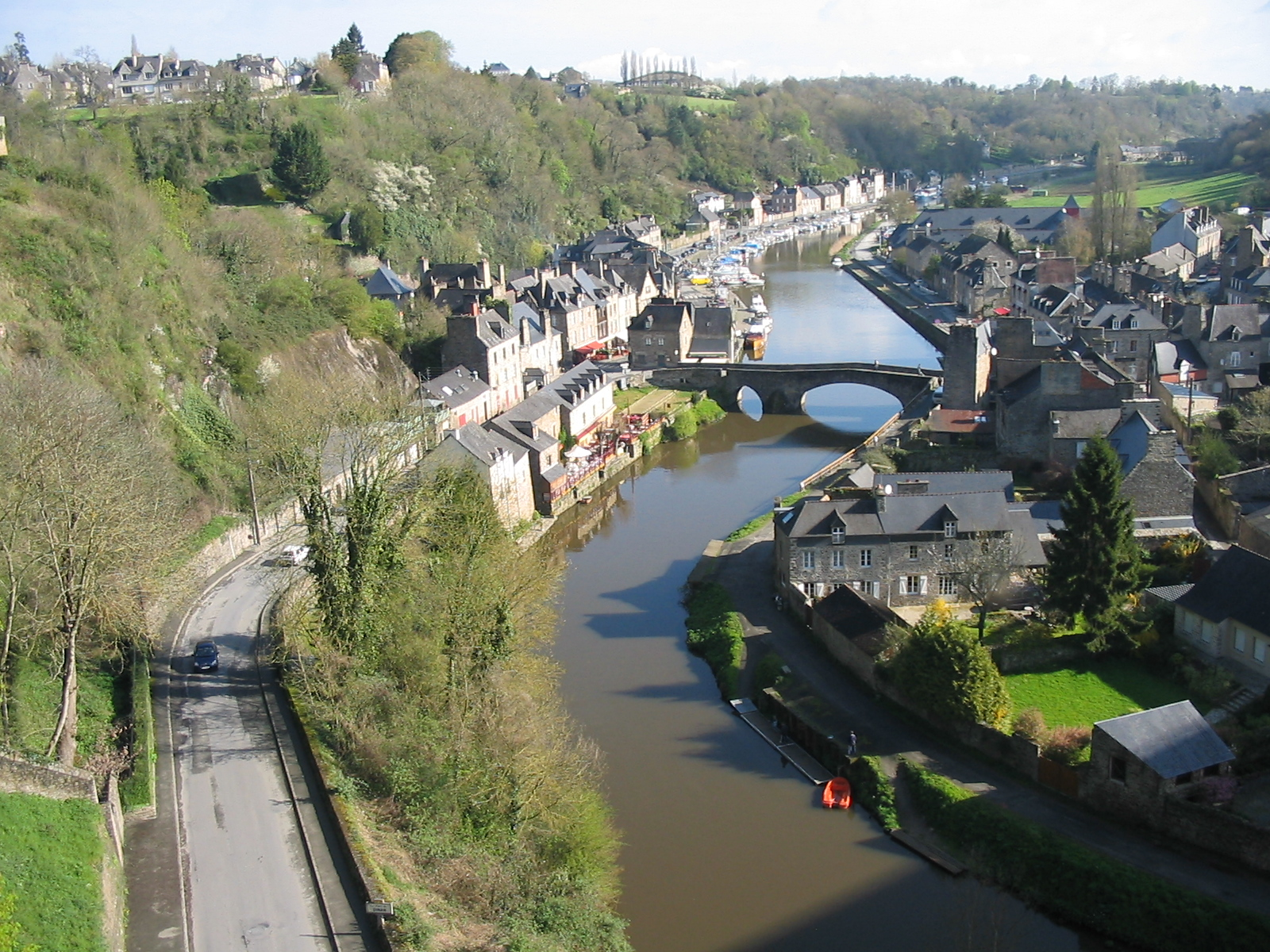 Vallée de la Rance à Dinan (Côtes d'Armor). Je suis l'auteur du cliché pris en mai 2006